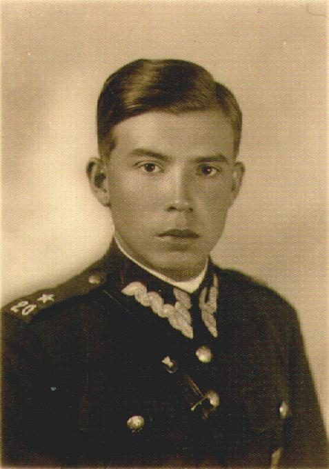 Julian Krzewicki jako ppor. 20 pp Z.K. rok 1934